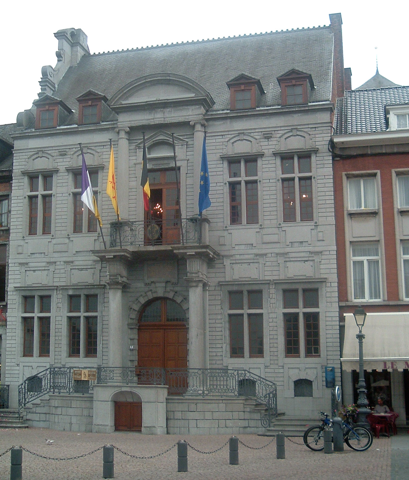 Hôtel de Ville d'Ath